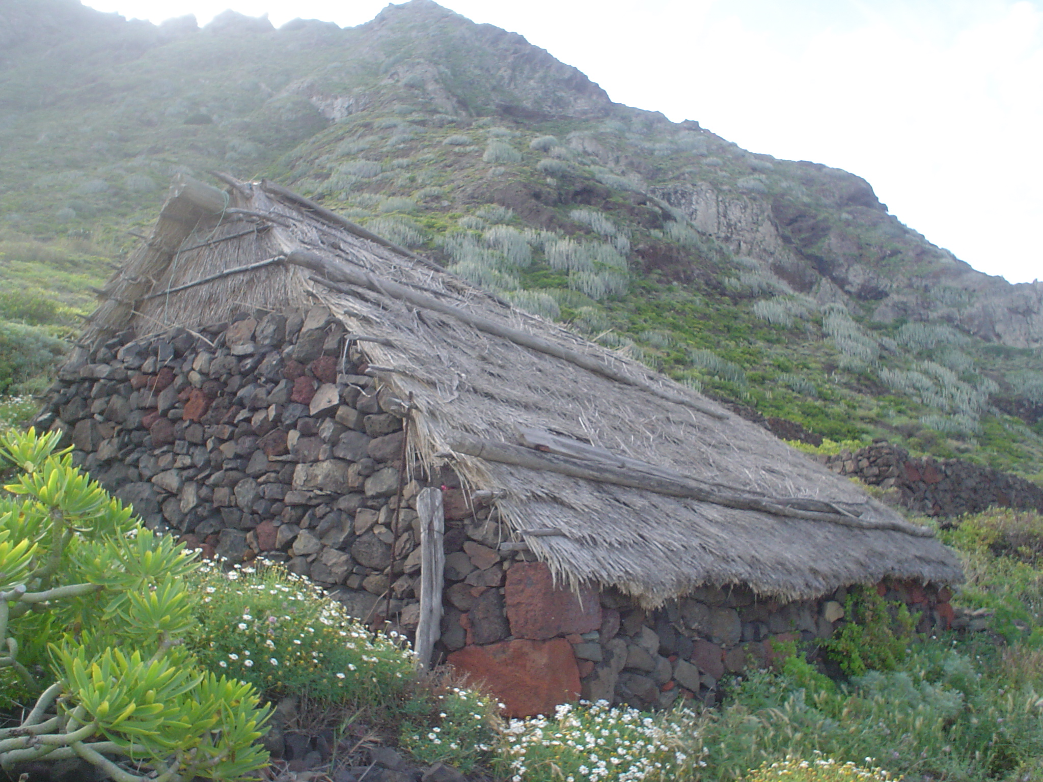 Choza o pajar en las cercanías de Tamadiste (Afur, Anaga).